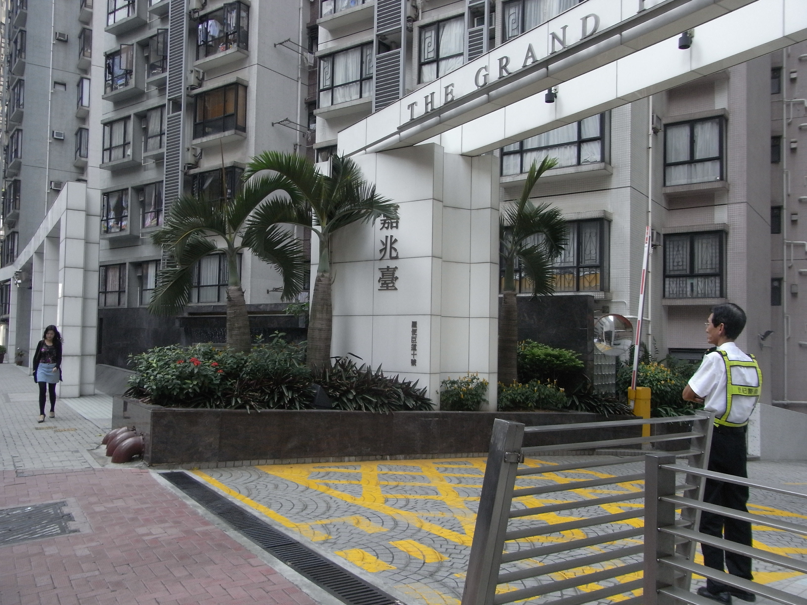 香港島半山區羅便臣道嘉兆臺